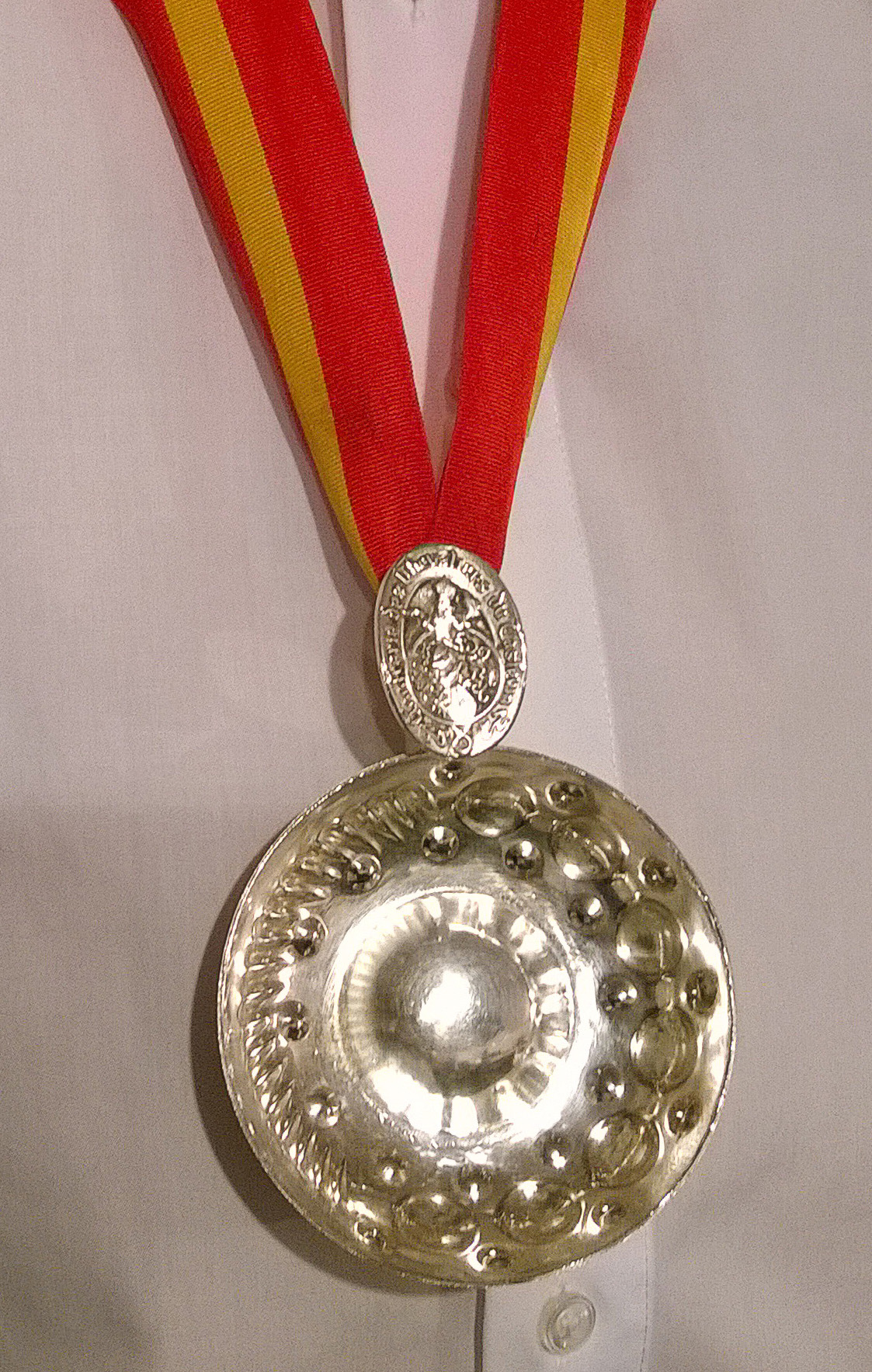 Tastevin 2016